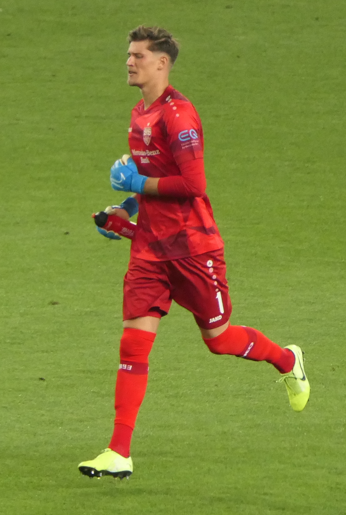 Der Fussballprofi Gregor Kobel im Trikot vom VfB Stuttgart beim Heimspiel gegen den VfL Bochum am 02.09.2019.